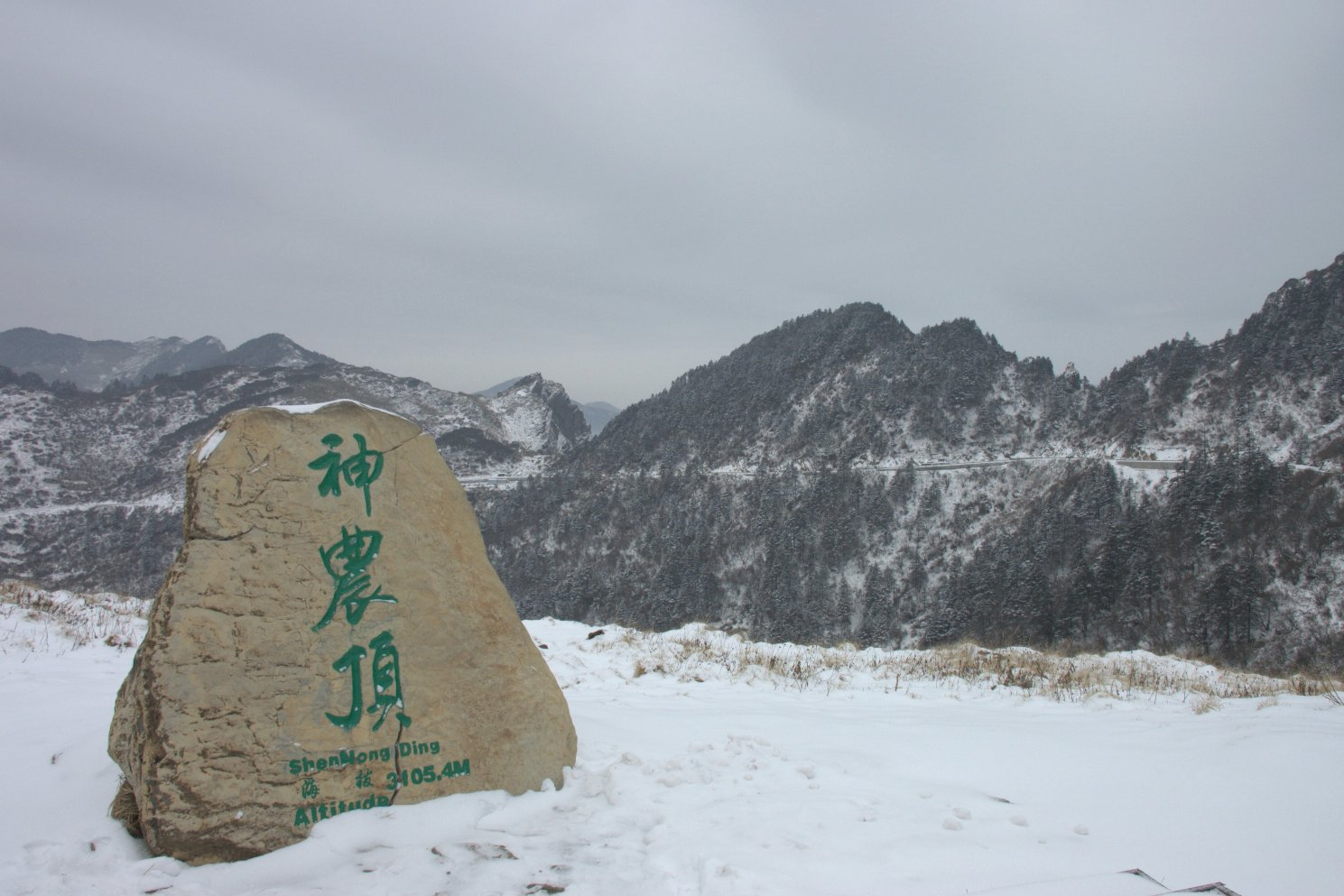 中国湖北 神农架 神农顶